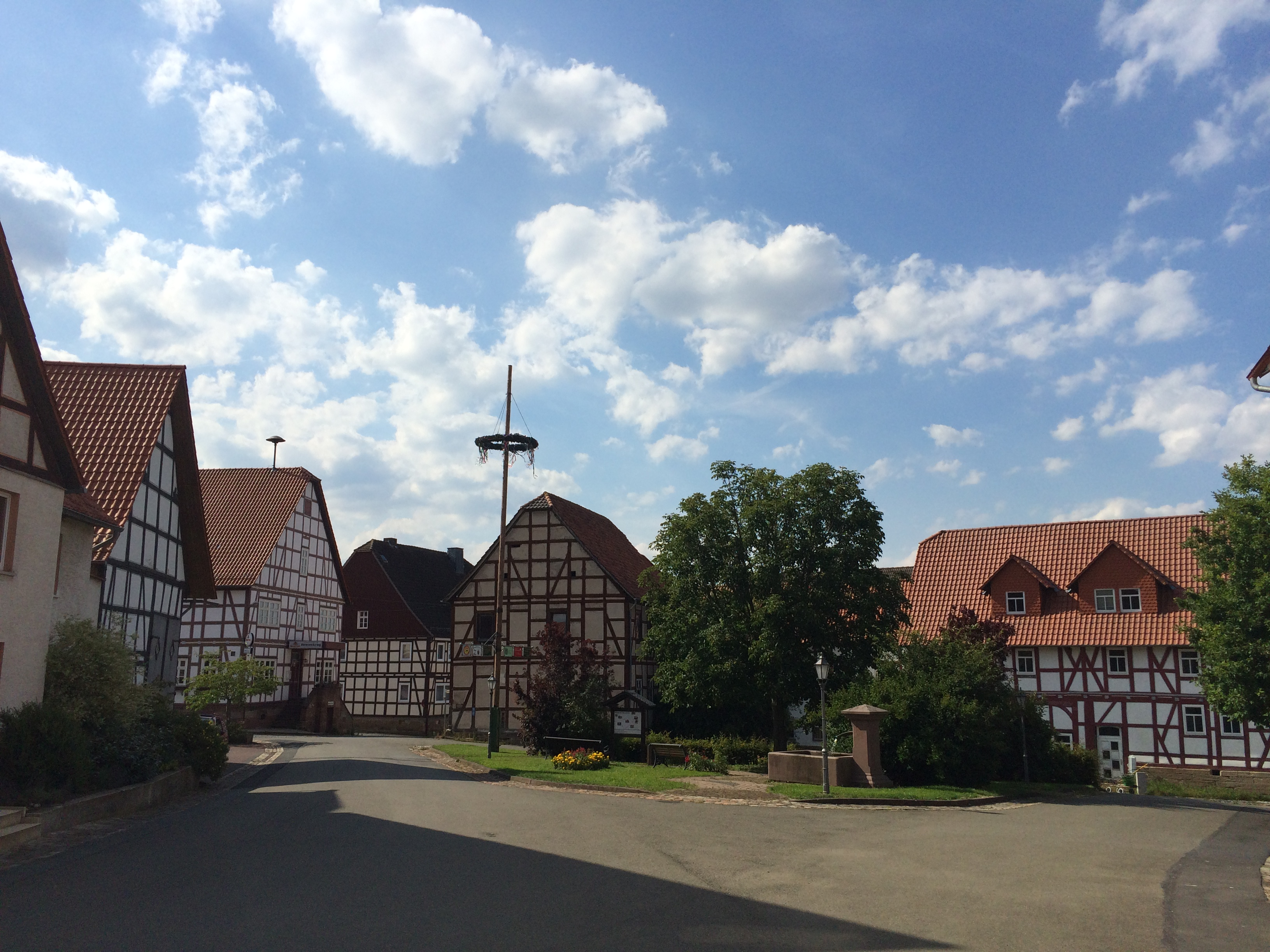 Der Dorfplatz in Viesebeck, aufgenommen aus der Elmarshäuser Straße